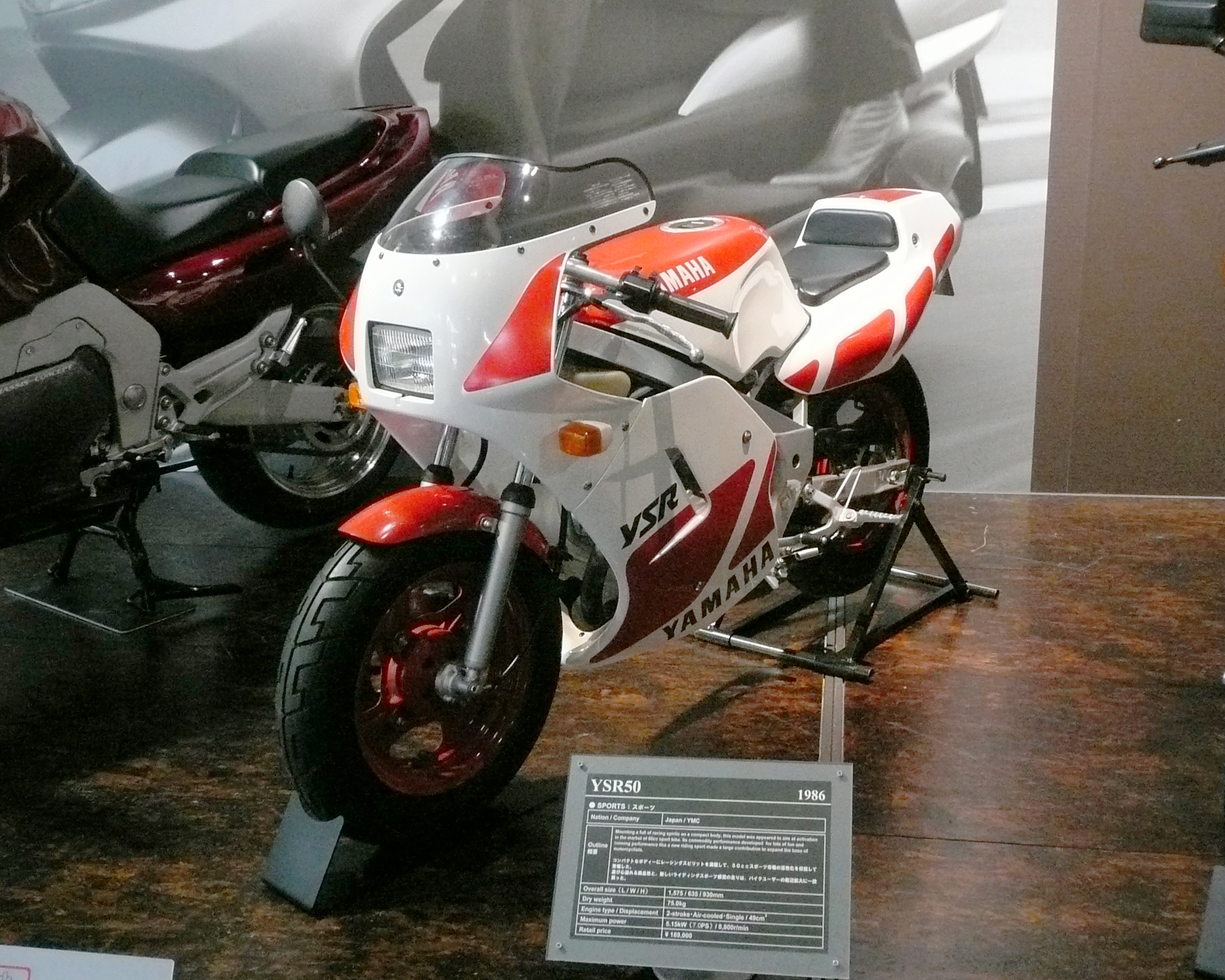 ヤマハ・YSR50 1986 ヤマハコミュニケーションプラザにて撮影